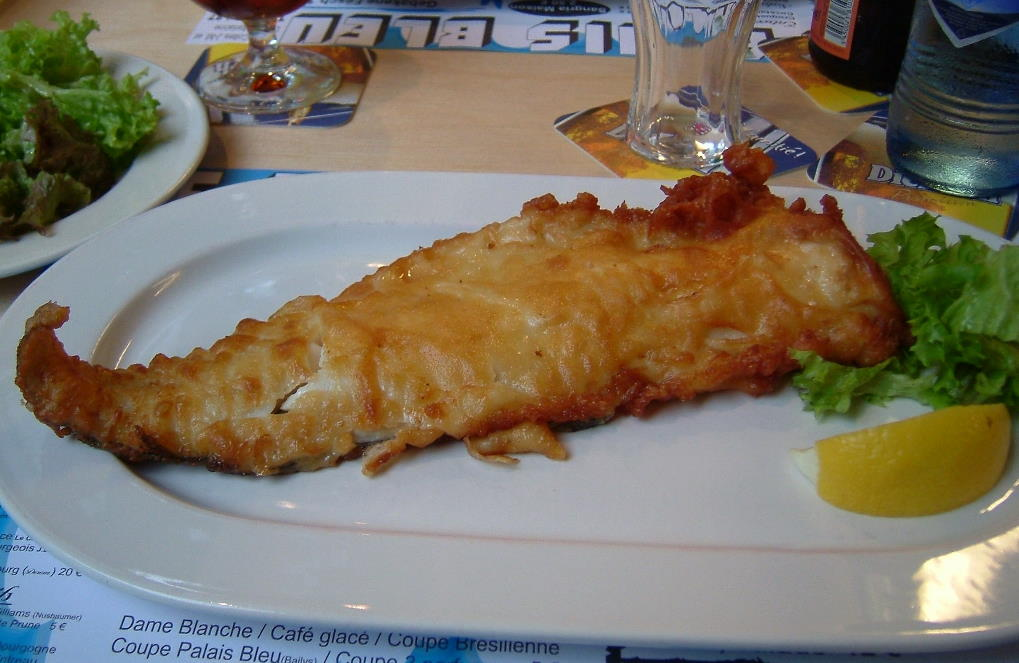 Gebake Fësch .